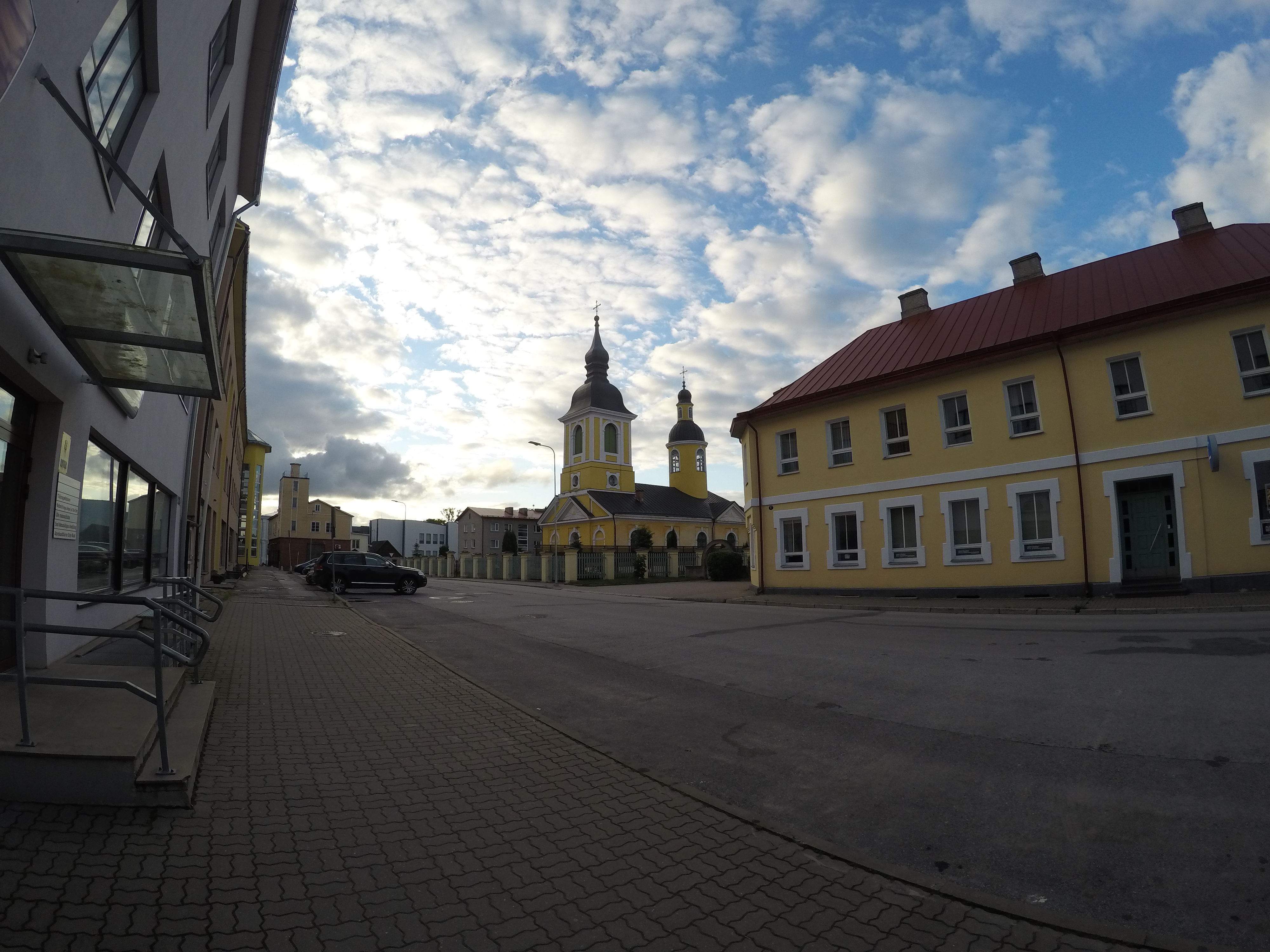 A Lembitu utca képe Vöru belvárosában.